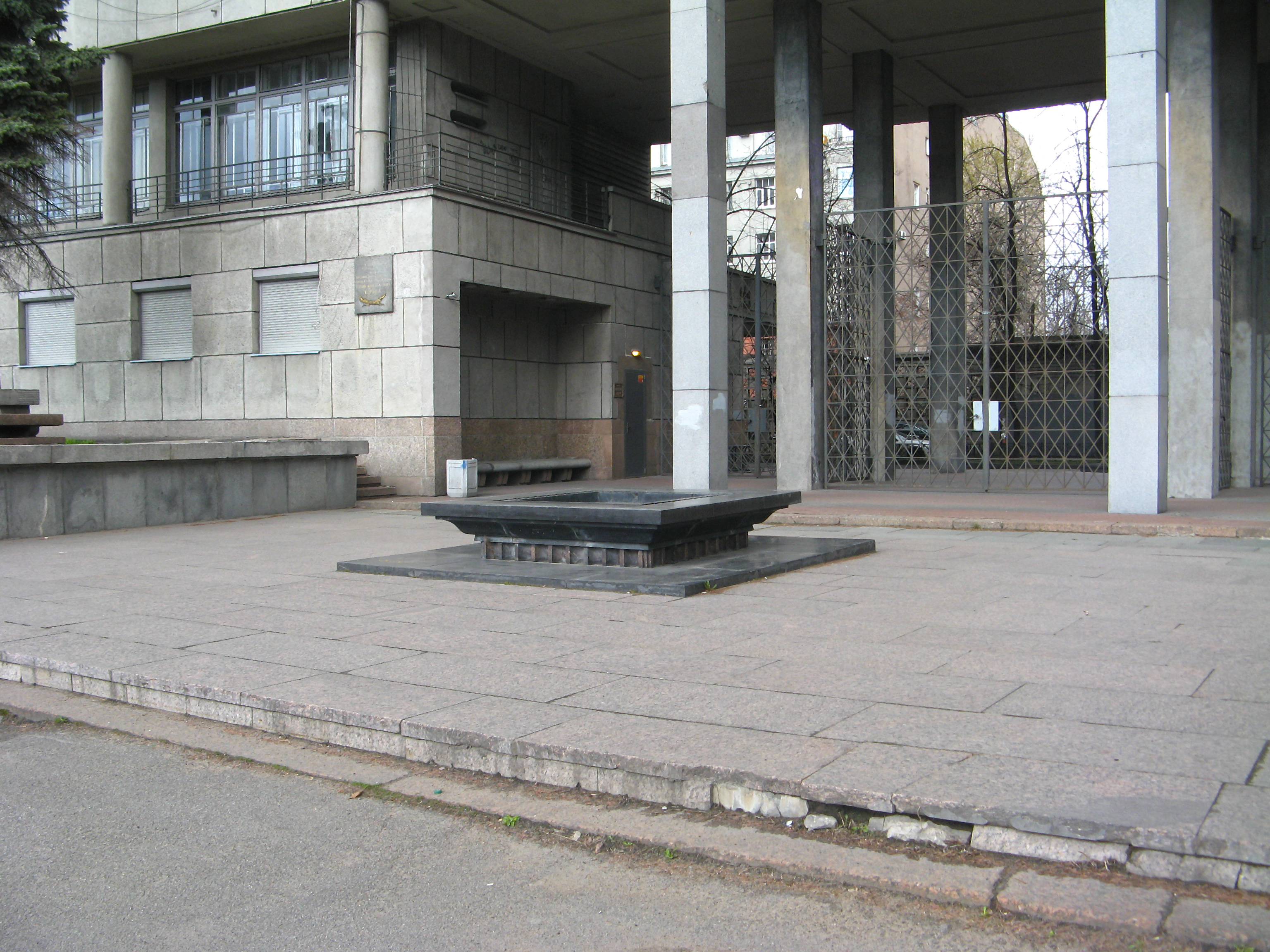 Первый жилой дом Ленсовета: набережная р. Карповки, 13, улица Литераторов, 10, Петроградский район, Санкт-Петербург